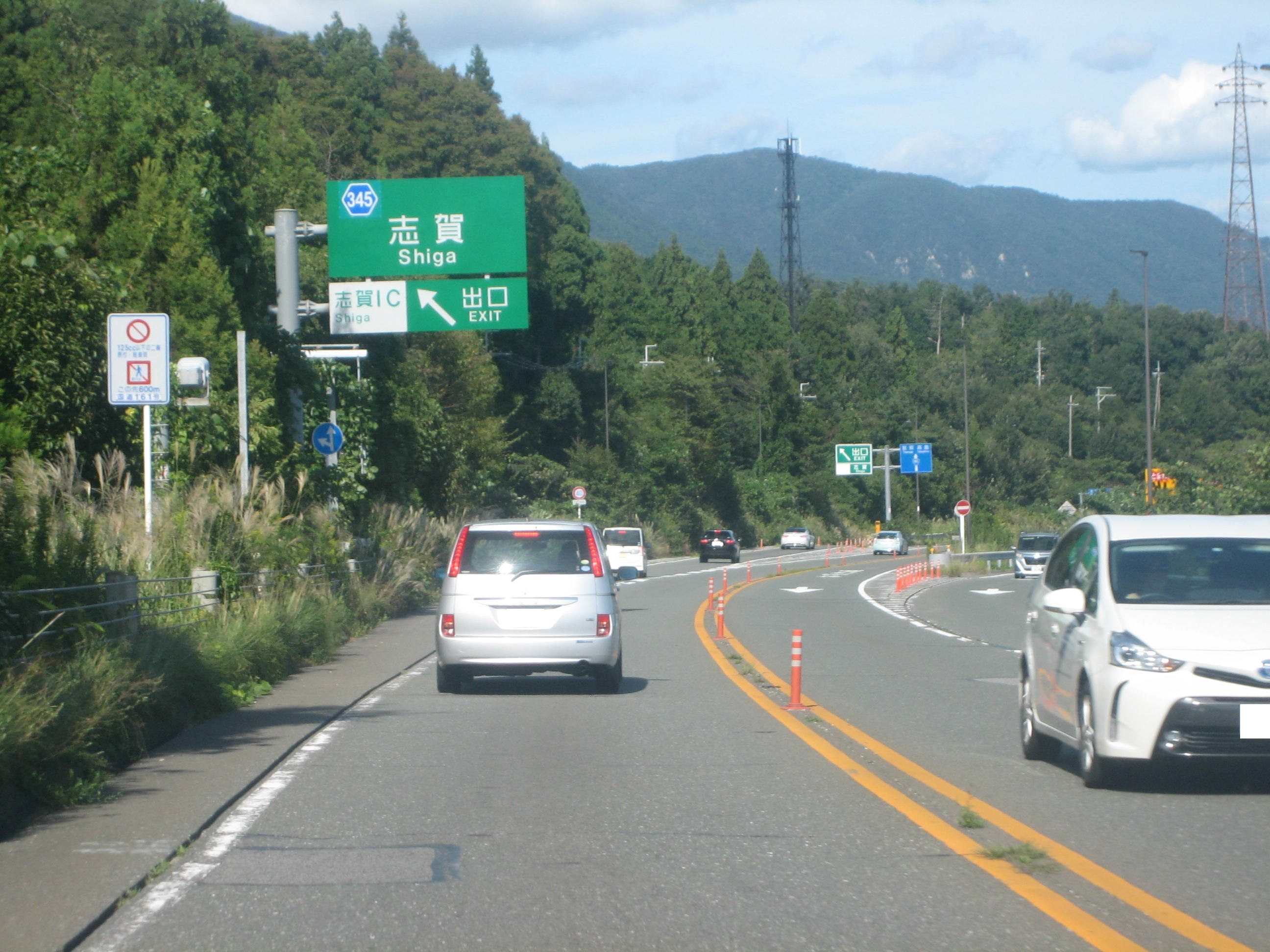 志賀IC分岐